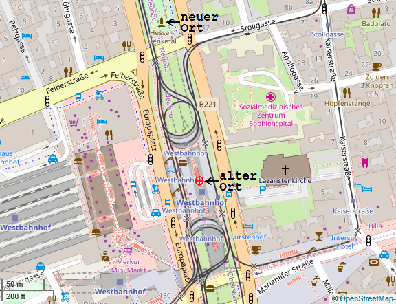 Hesser-Denkmal-Orte, alt und neu.